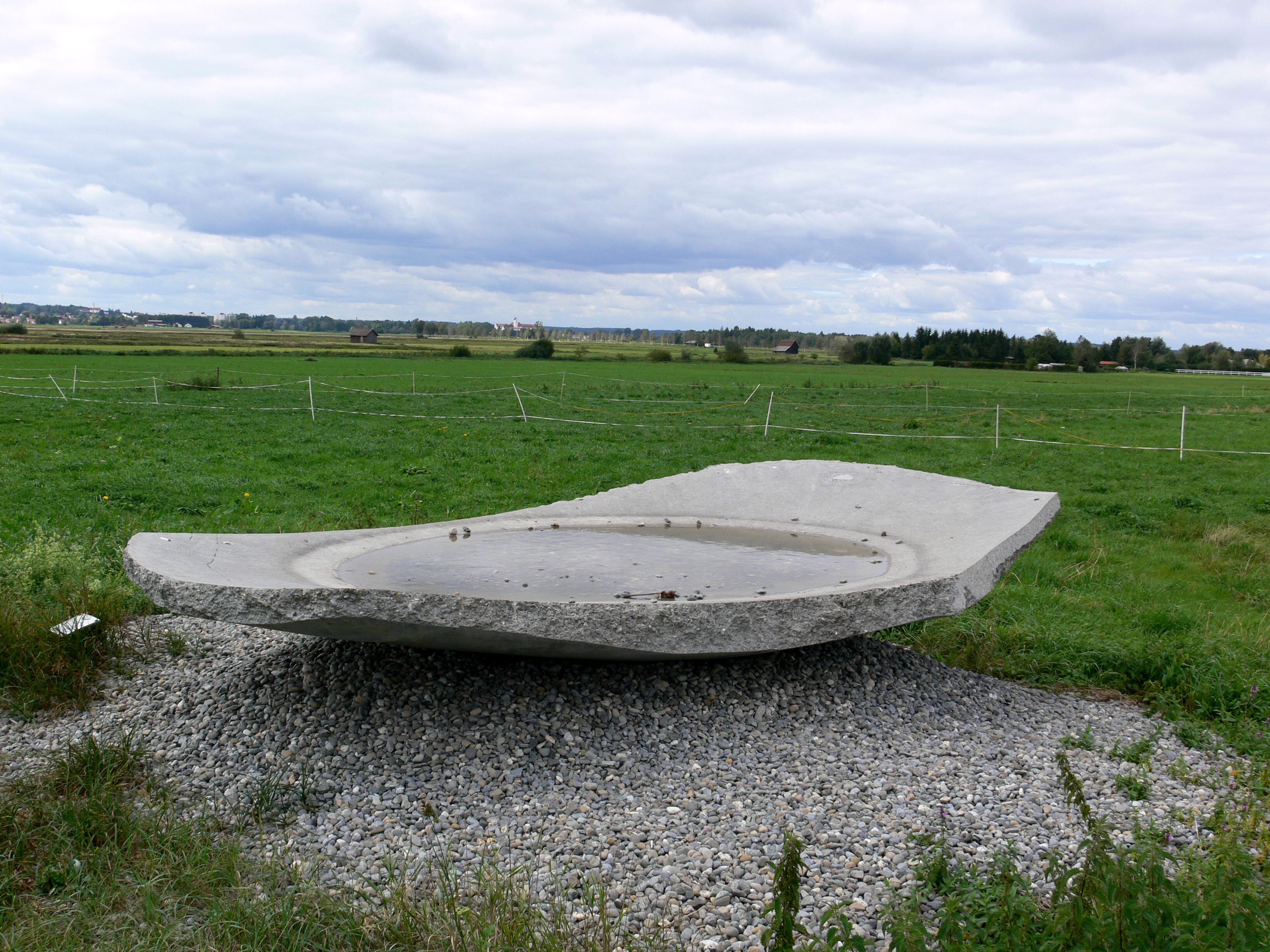 Skulpturenfeld Oggelshausen, Landkreis Biberach Europäisches Bildhauersymposium 2000 Gerold Jäggle: Schale (Federschale)